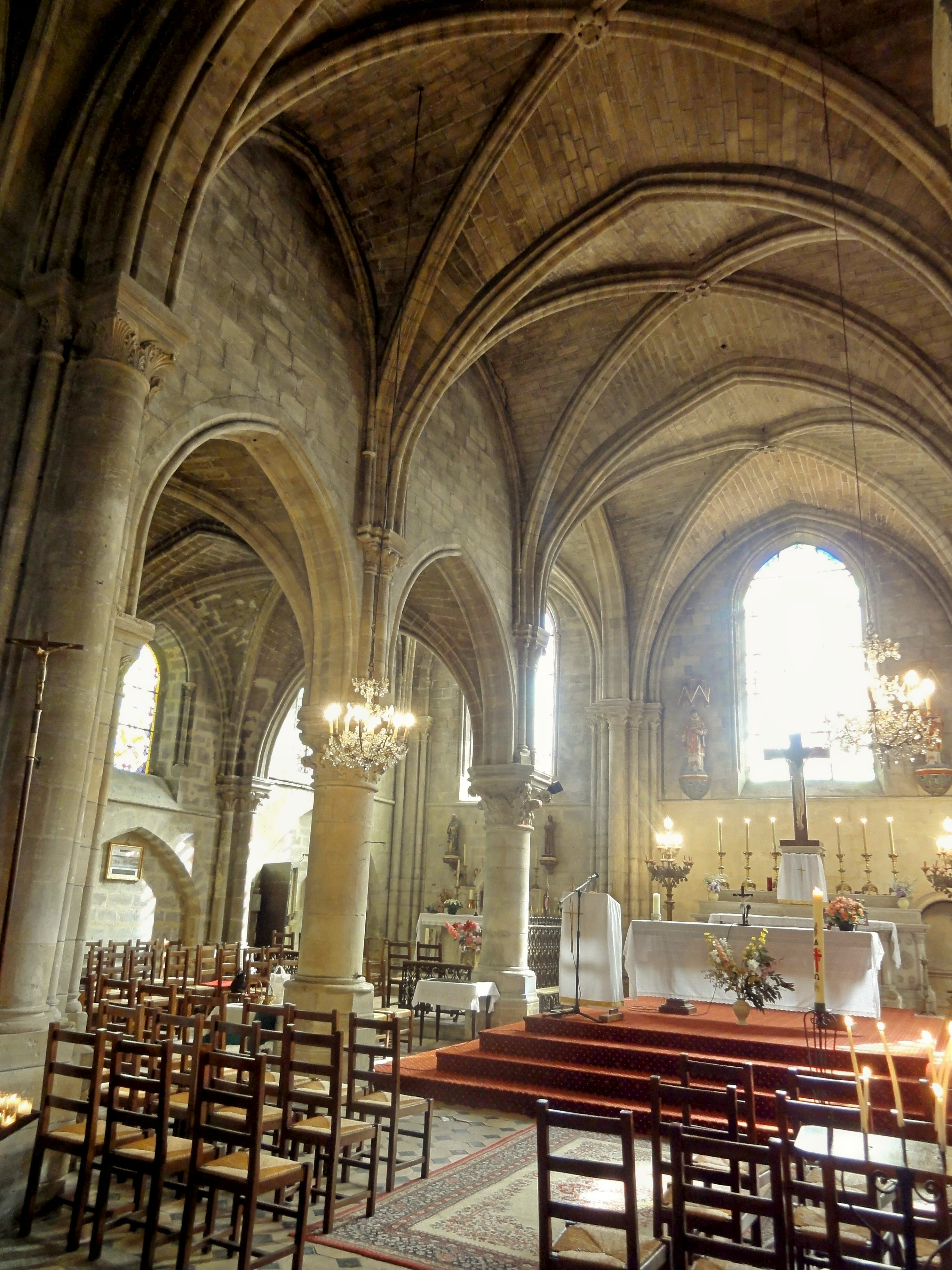 Chœur ; grandes arcades au nord.